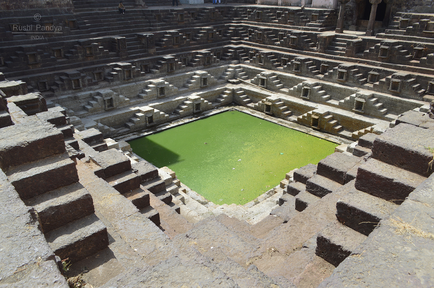 ગુજરાતી: કુંડવાવ કપડવંજ